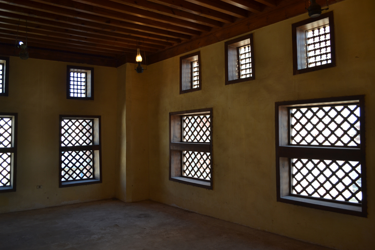 منزل الأمصيلي